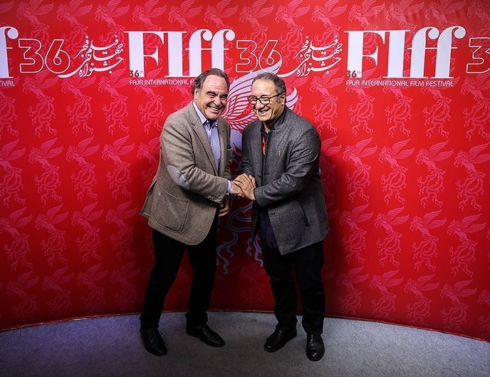 حضور الیور استون در جشنواره جهانی فیلم فجر